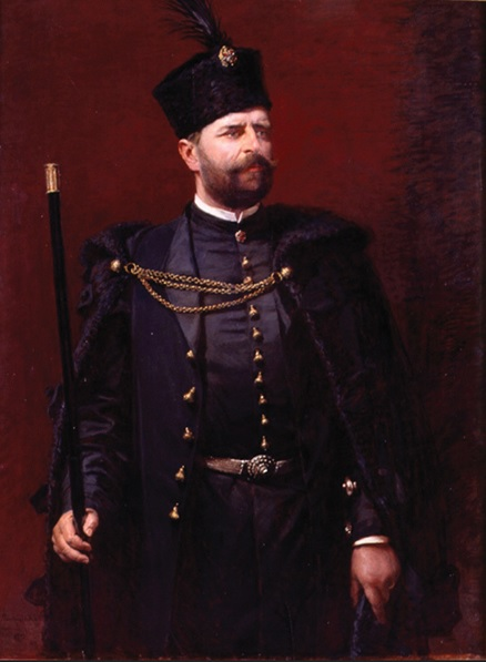 Andrzej Potocki (1861-1908) Category:Polish historical images